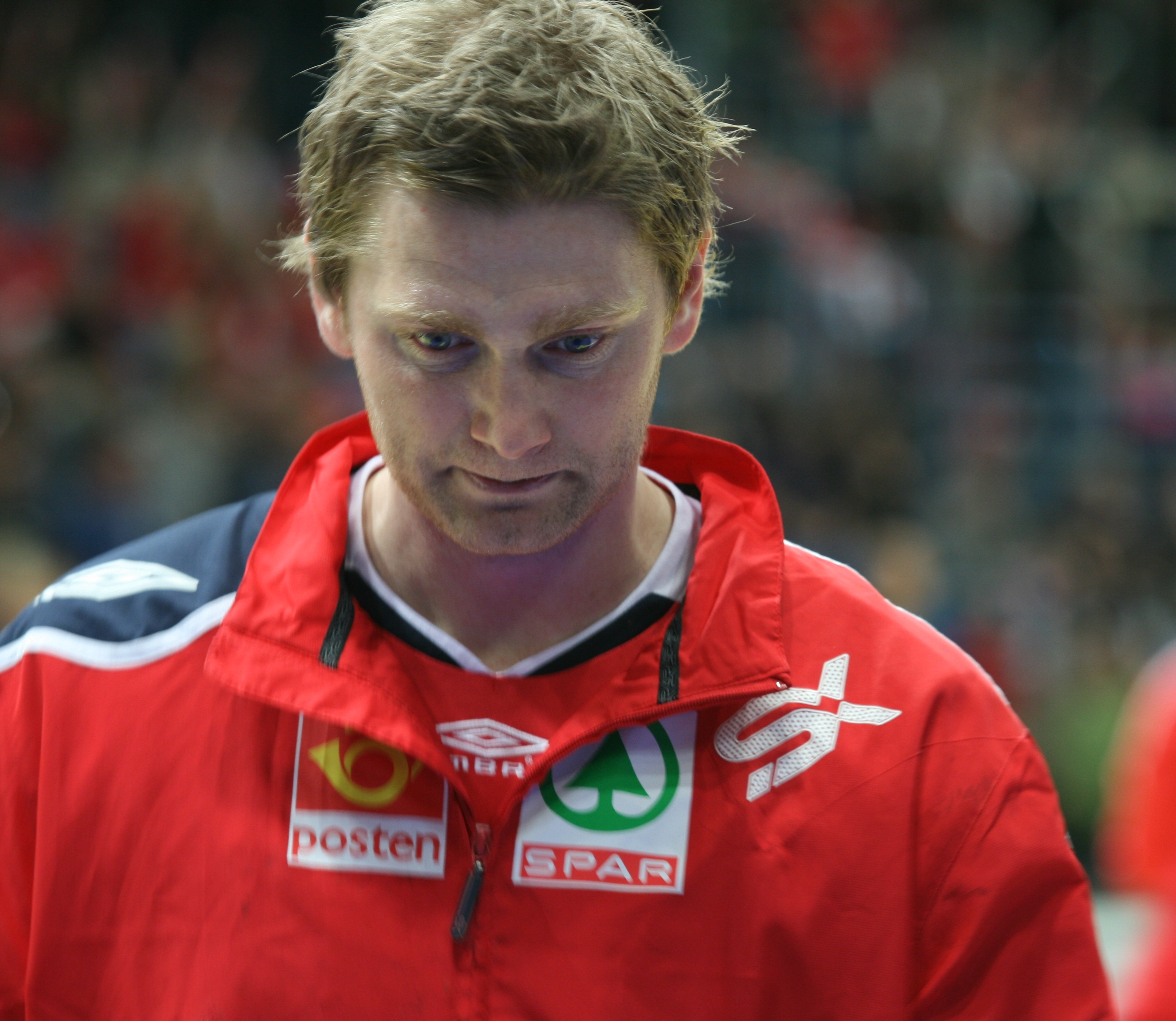 Jan Thomas Lauritzen, Norwegian handballer, in Stavanger